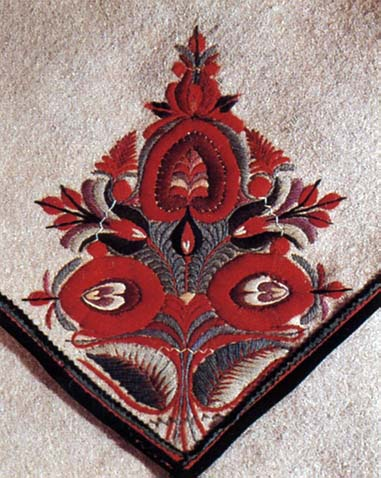 Gyapjúfonállal hímzett szűrgallér sarokvirága, szűrhímzés (Gyöngyös, Heves m., 19. sz. vége)